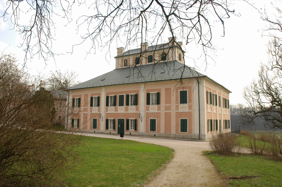 Ratibořice; zámek, hlavní průčelí)